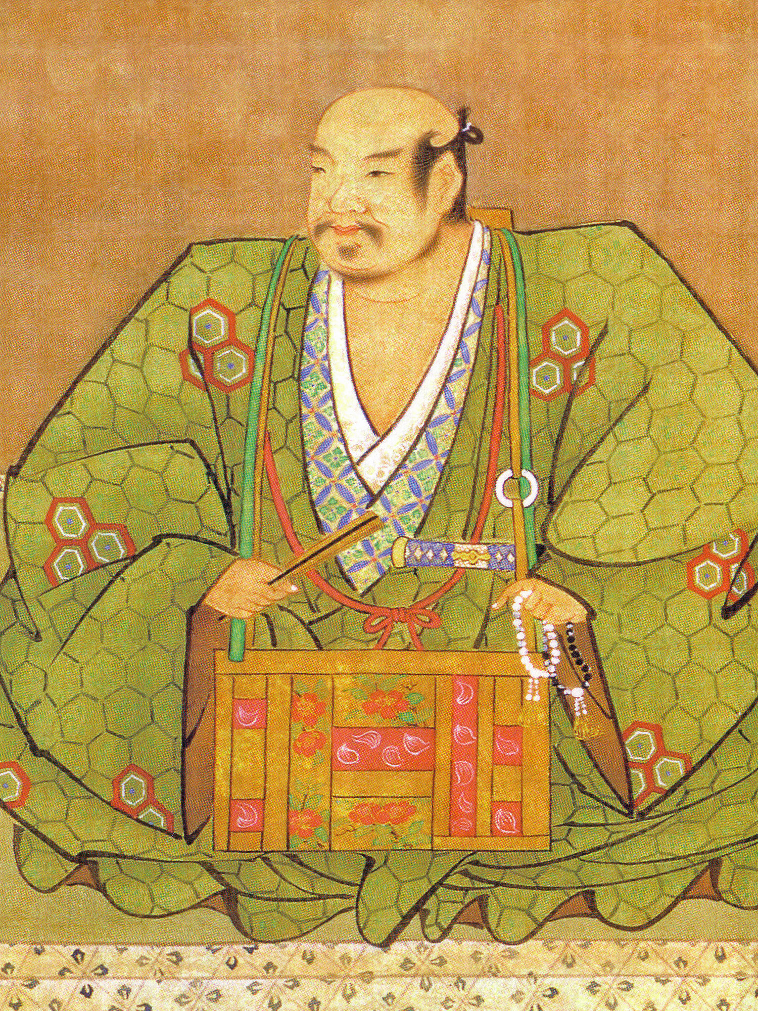 浅井長政像